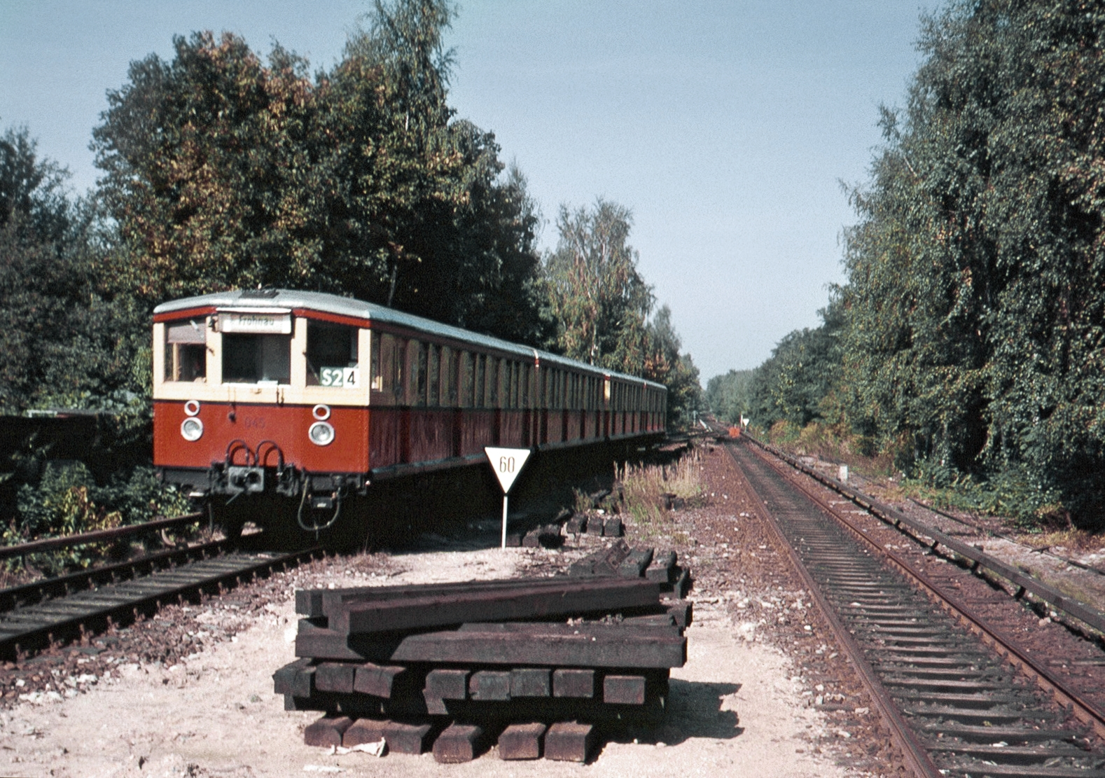 S-Bahn-Zug bei der Einfahrt in den Bahnhof Berlin-Lichtenrade